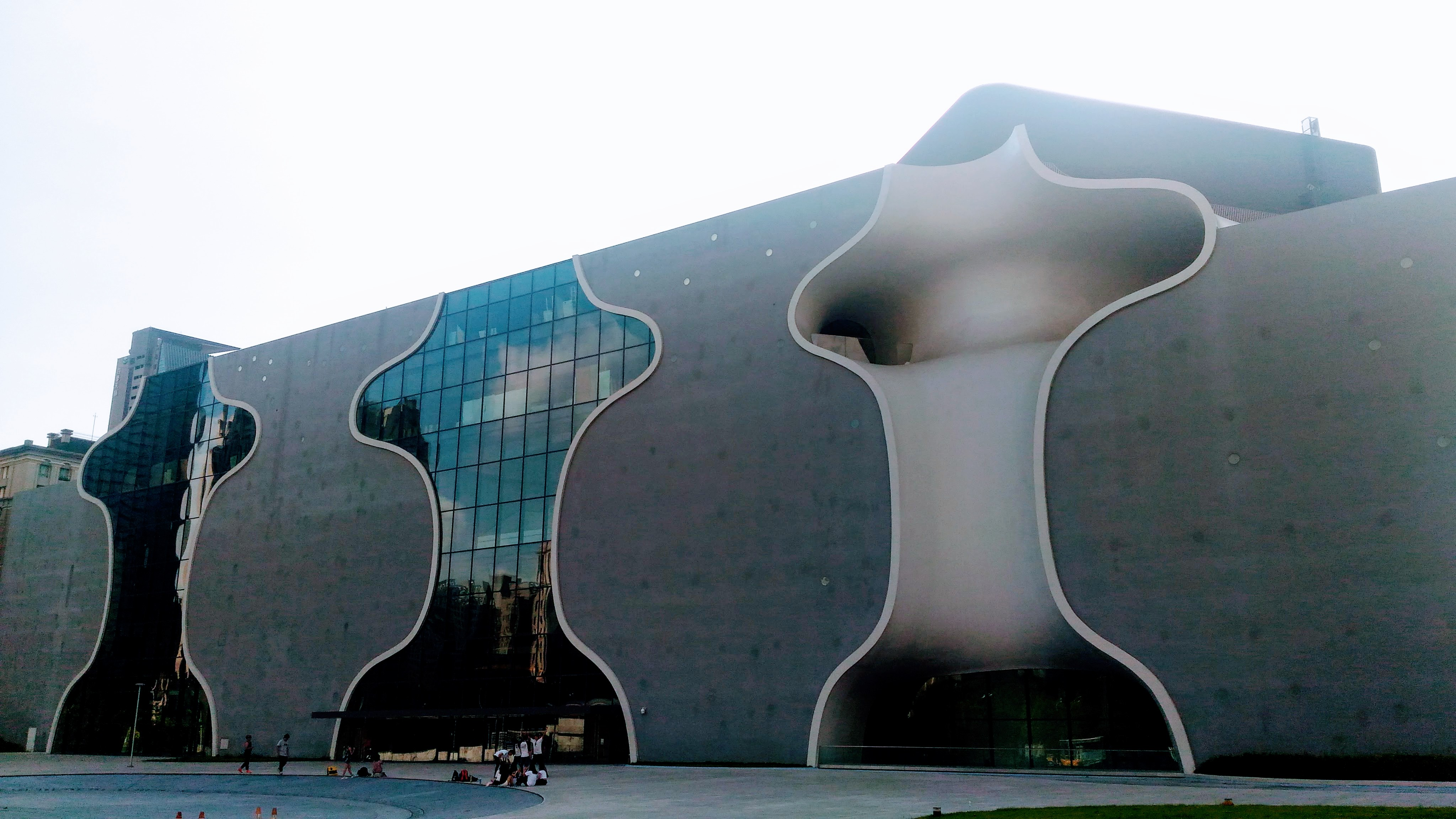 中文（台灣）: 位於台中市西屯區的國家表演藝術中心-臺中國家歌劇院是日本建築師伊東豊雄的作品，是台灣少有的數位建築作品。